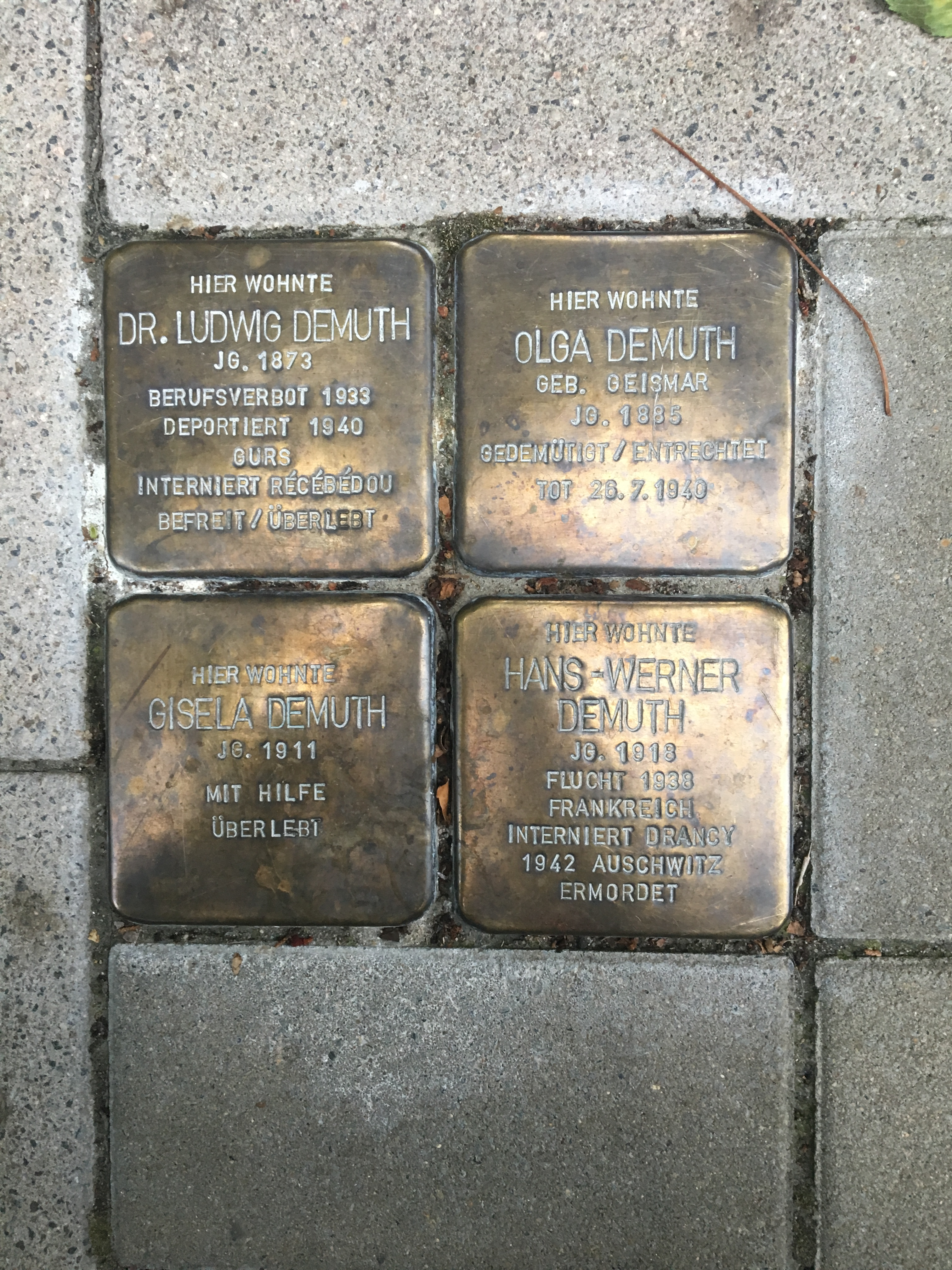 Stolpersteine de la famille Demuth, à Heidelberg, Hainsbachweg